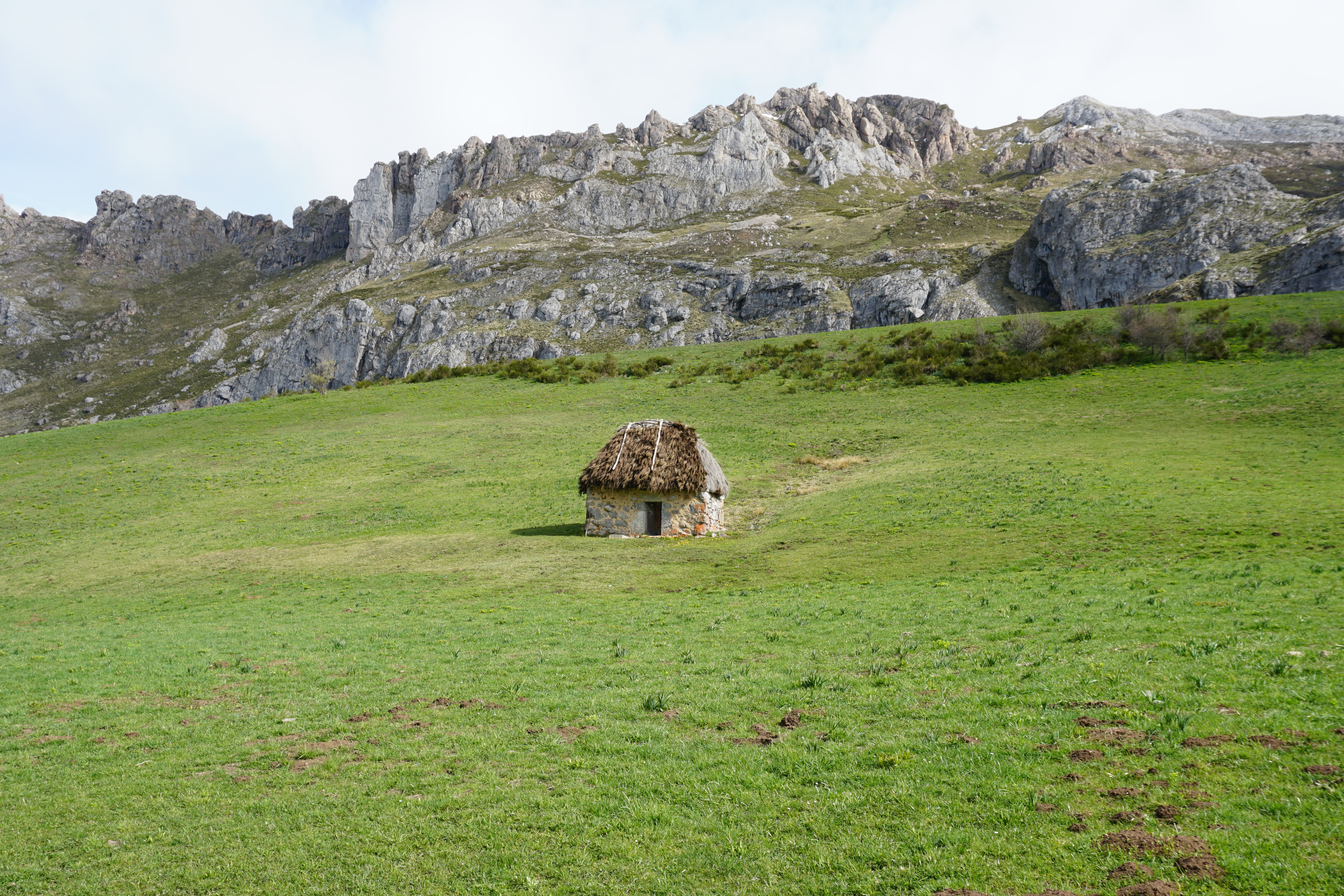 Somiedo This is a photography of a Special Area of Conservation in Spain with the ID: ES0000054. Natura2000 entry, EEA entry